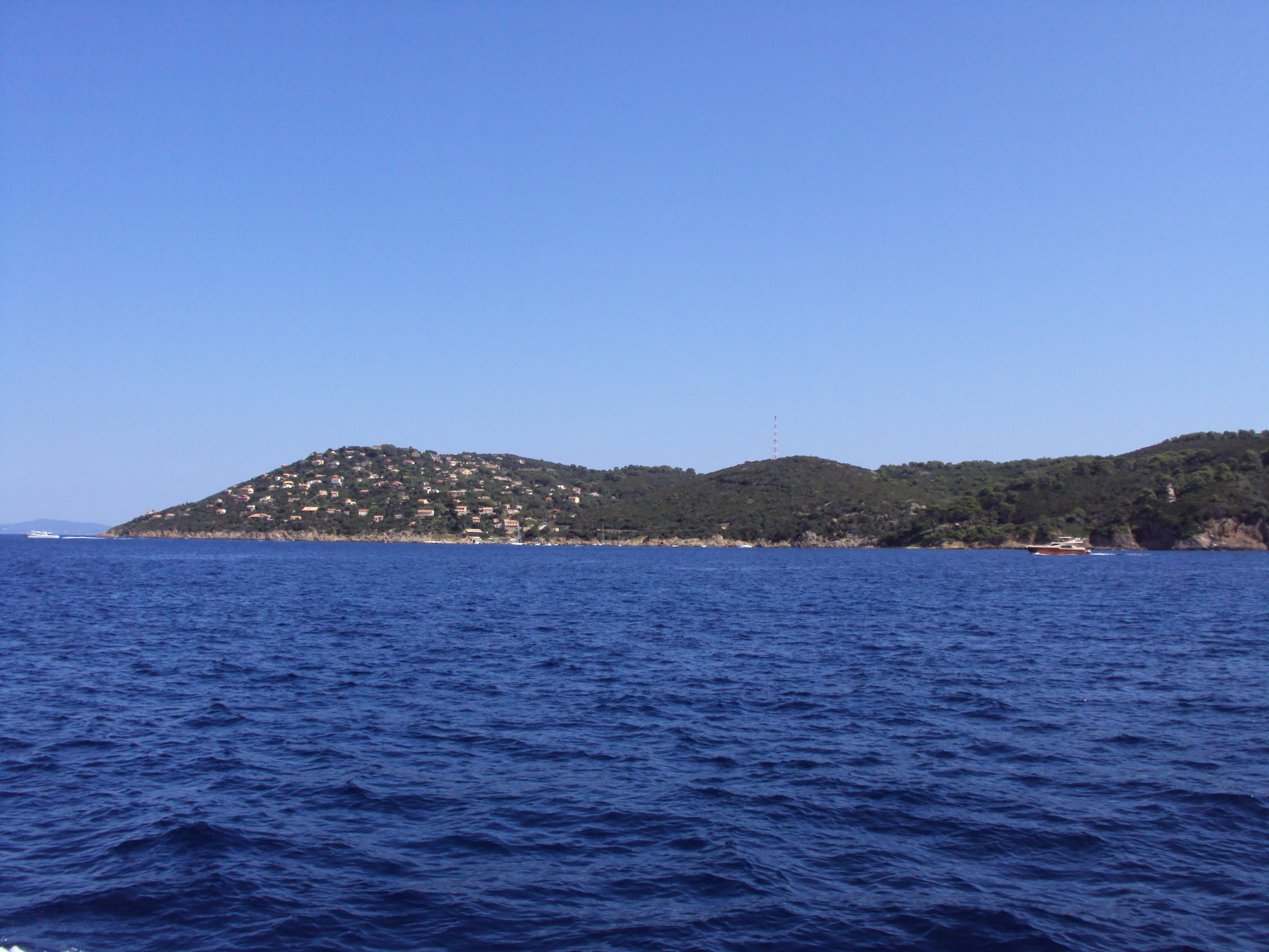 Vue de la côte ouest de l'île du Levant (îles d'Hyères, Var, France).